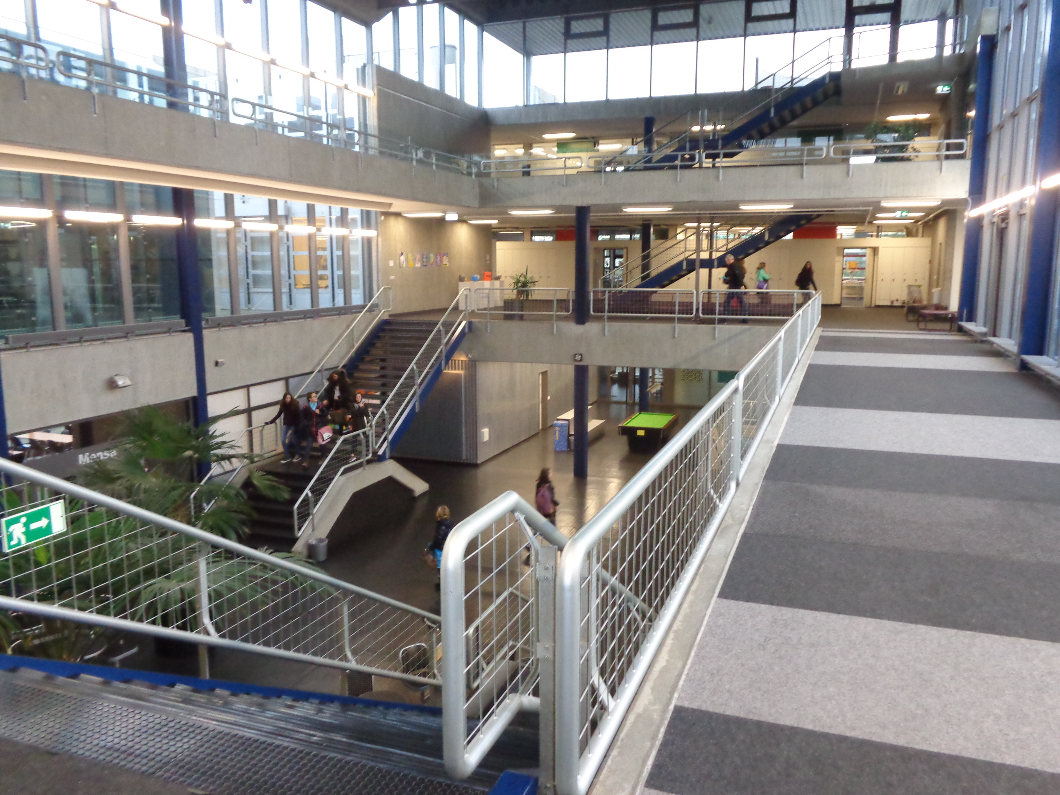 Freies Gymnasium Bern, Blick vom Naturwissenschaftstrakt in die Halle, den Haupversammlungsplatz der Schülerschaft.